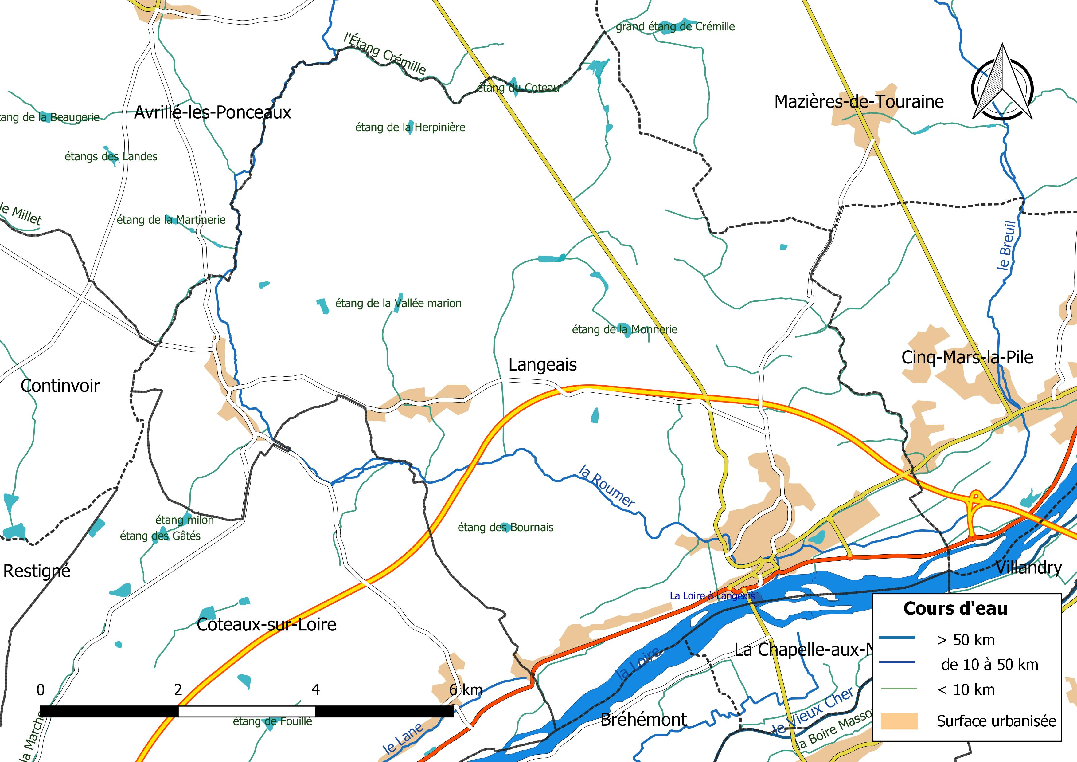 Carte du réseau hydrographique de la commune de Langeais (France).